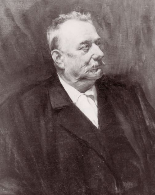 Theodor Ziegler 1832-1917, Winterthur ZH, Schweiz